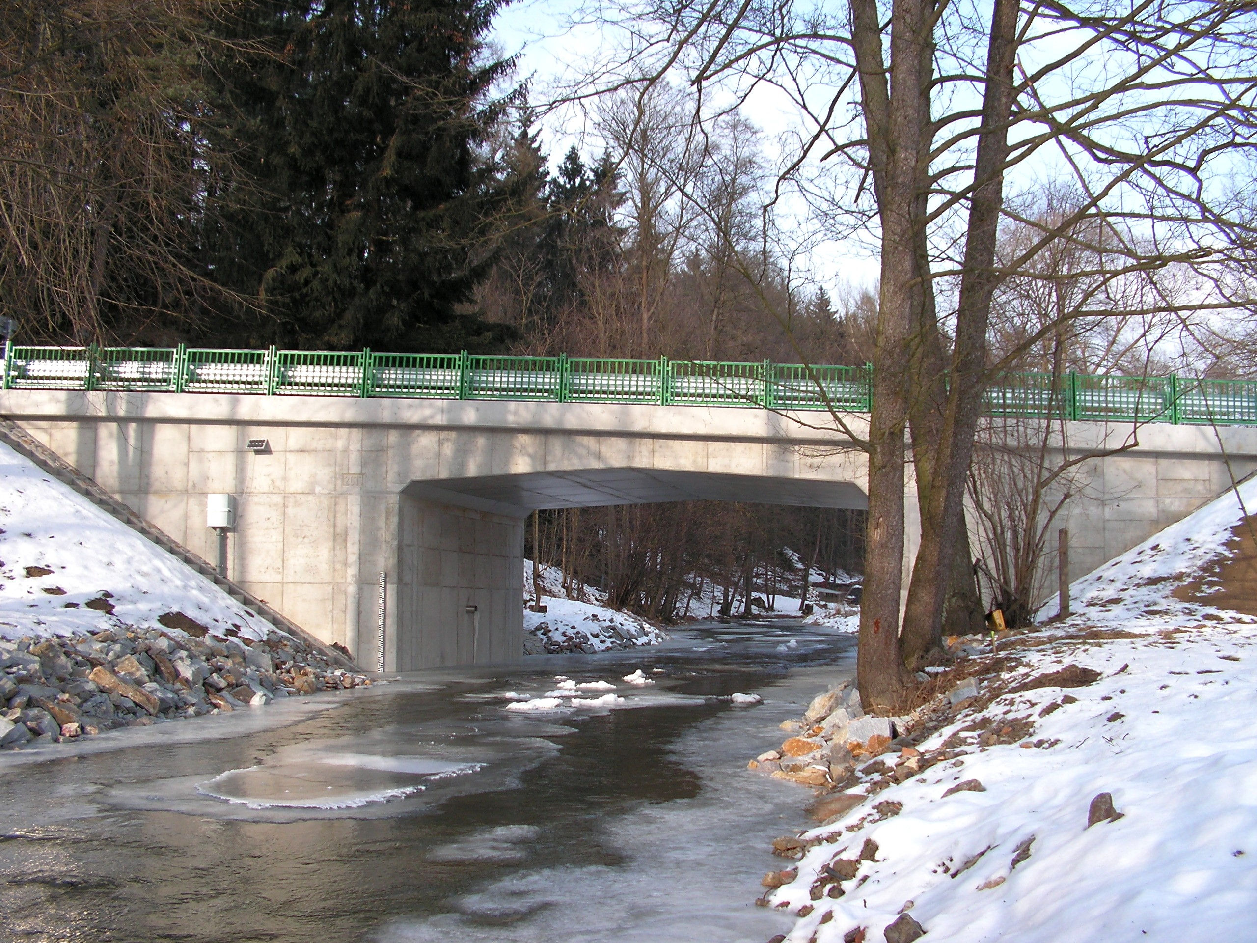 Nový most u Josefodolu přes říčku Sázavku na jejím 2,30 říčním kilometru.